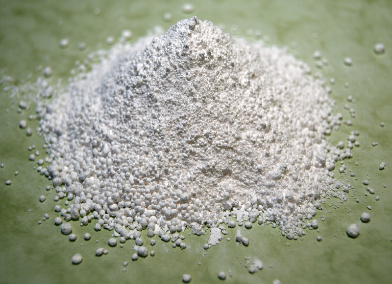 Ein Häufchen Magnesiumcarbonat (Durchmesser ca. 10 cm).